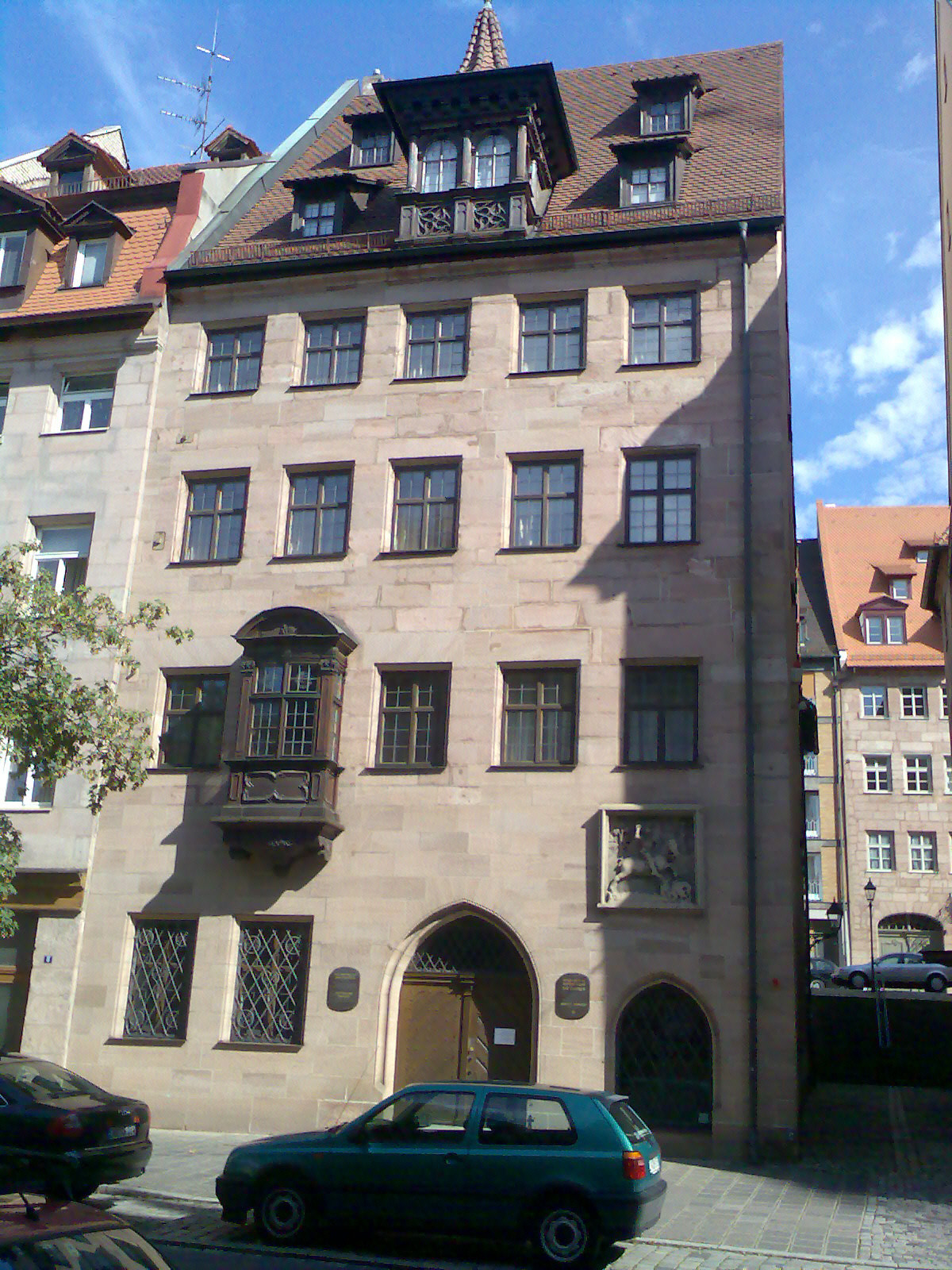 Praunsches Stiftungshaus - Nürnberg - Weinmarkt 6